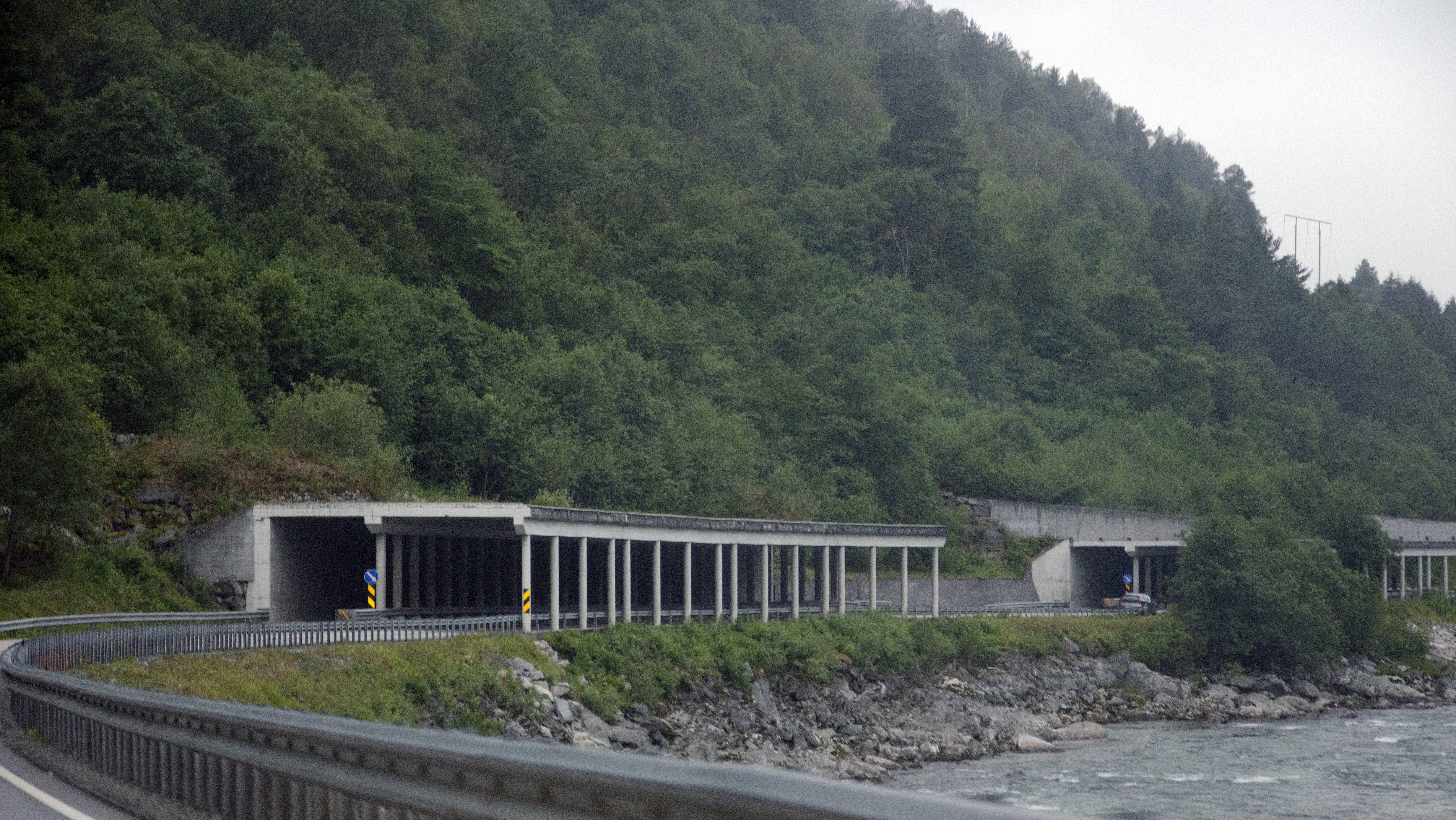 Flatvaduroverbyggene på riksvei 70 i Sunndal